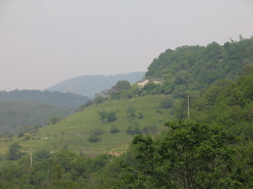 La casa di Mazzarino posta sulla collina di Marezzane nel Parco della Lessinia